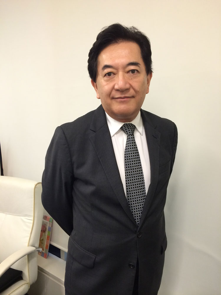 2014/9/3、日本、東京都千代田区麹町にて撮影。被撮影者本人へのライセンス許諾済。